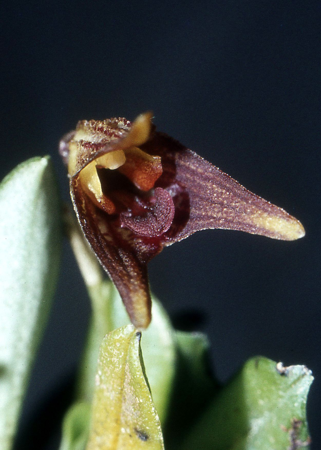 Masdevallia aphanes